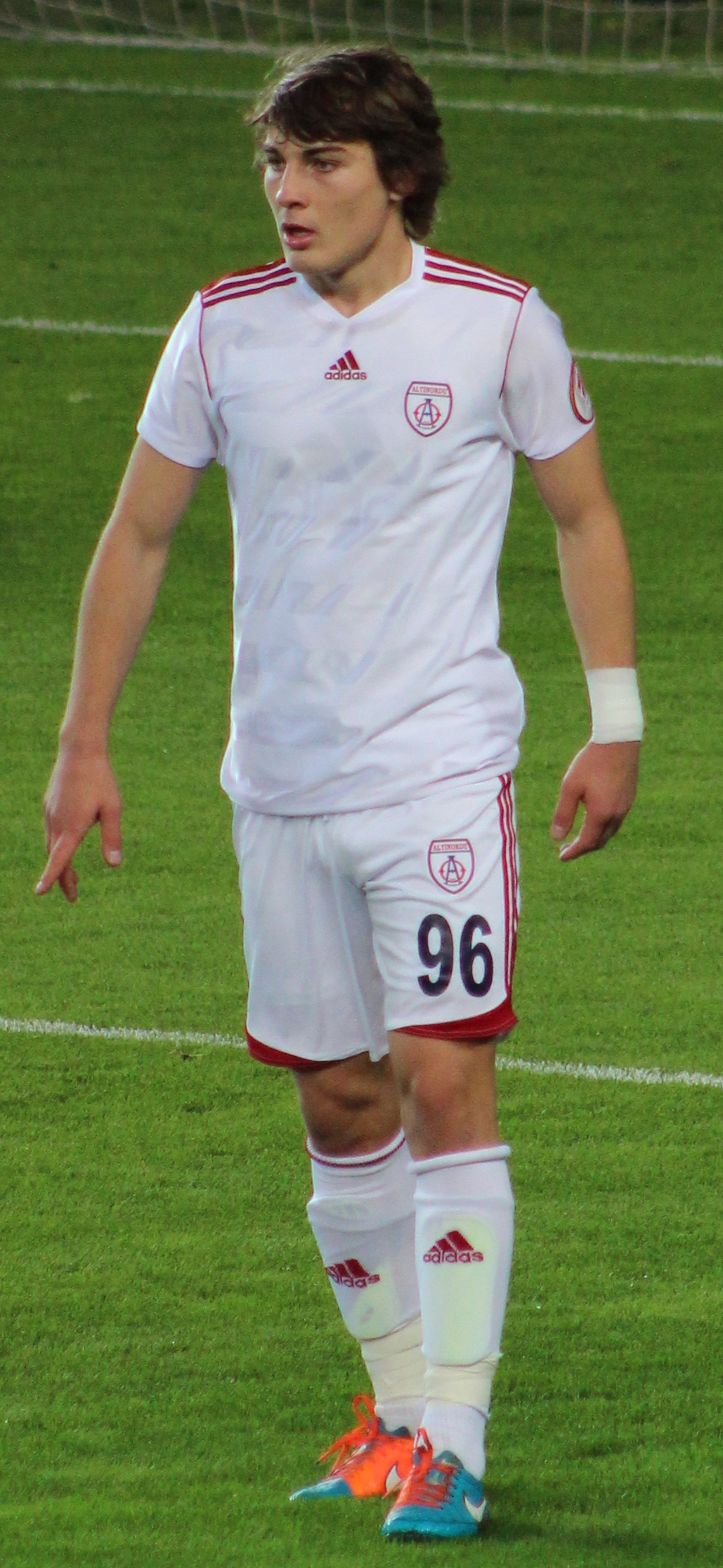 Caglar Soyuncu @ Fenerbahce - Altinordu 23 December 2014